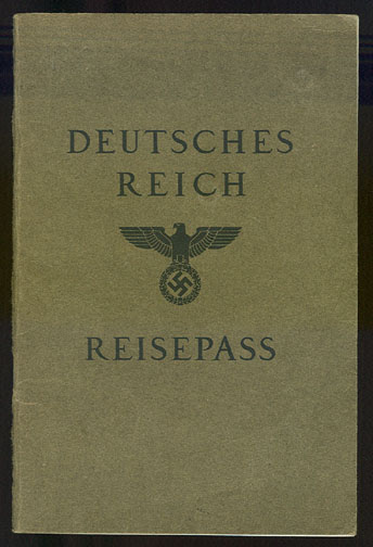 جواز الماني نازي